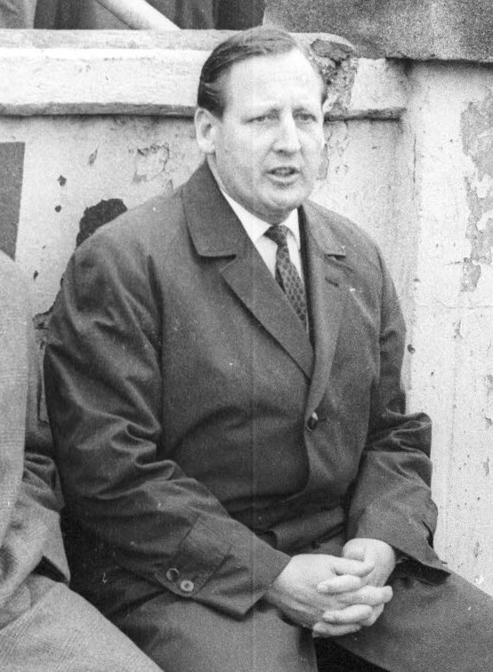 Freundschaftsspiel im Holsteinstadion. Im Bild u.a. Braunschweigs Trainer Helmuth Johannsen (Bildmitte).